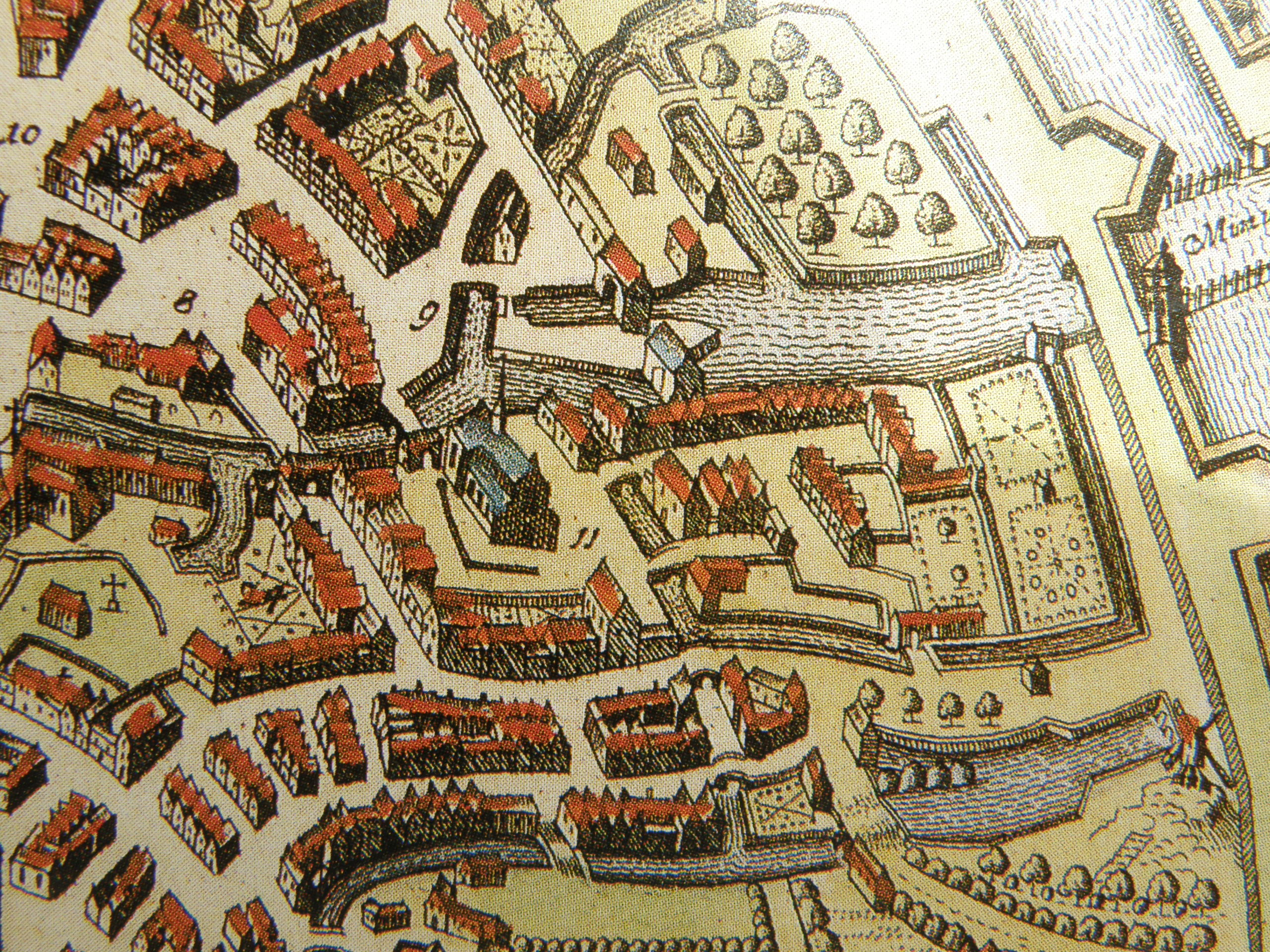 Flandria Illustrata, A. Sanderus, La Haye 1732, selon le plan de même titre de 1641 (extrait). Reproduit dans Marc Ryckaert, Historische stedenatlas van België. Brugge, éd. Crédit communal de Belgique, p. 80-81. Au centre, le béguinage avec son église ; en haut à droite, le Minnewater et les remparts.